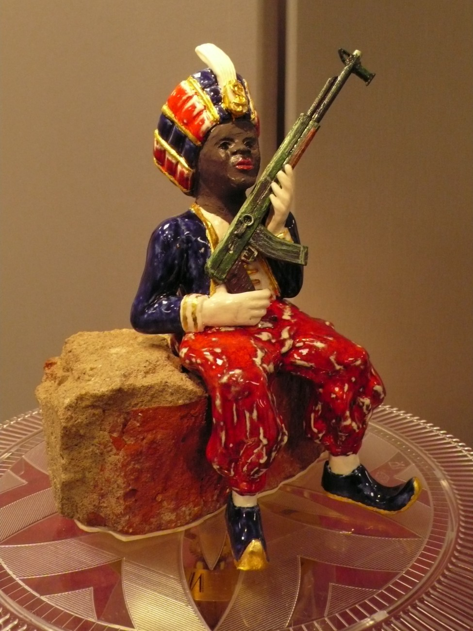 Porzellanfigur "Sarottimohr" von Jörg Marx